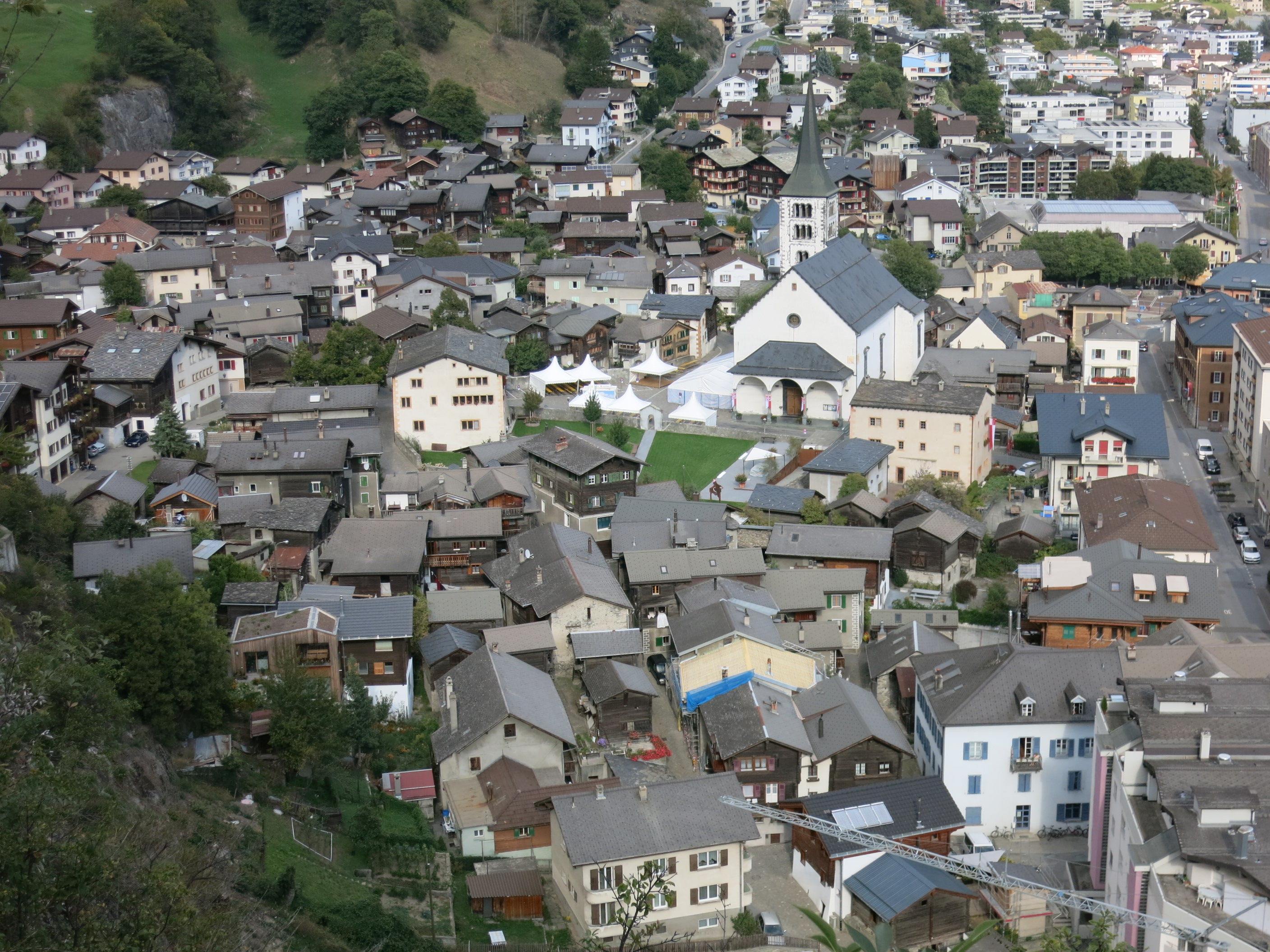 Naters VS, Schweiz